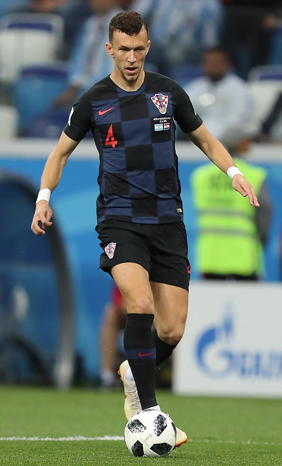 Это фиаско. Боль сборной Аргентины в фотографиях